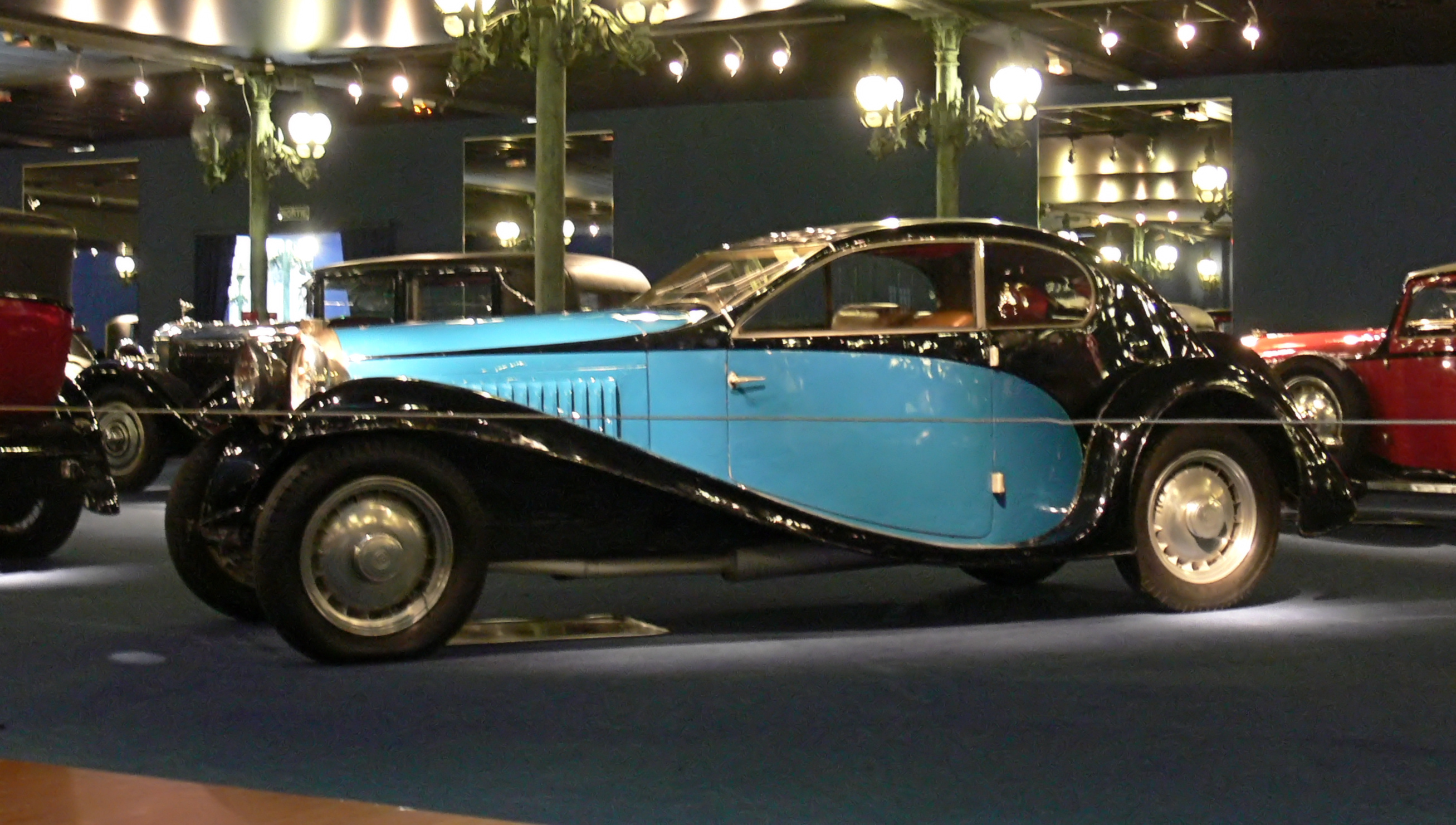 Bugatti Type 46 Coach surprofilé (1933) im Musée National de l'Automobile (Muhlhouse)